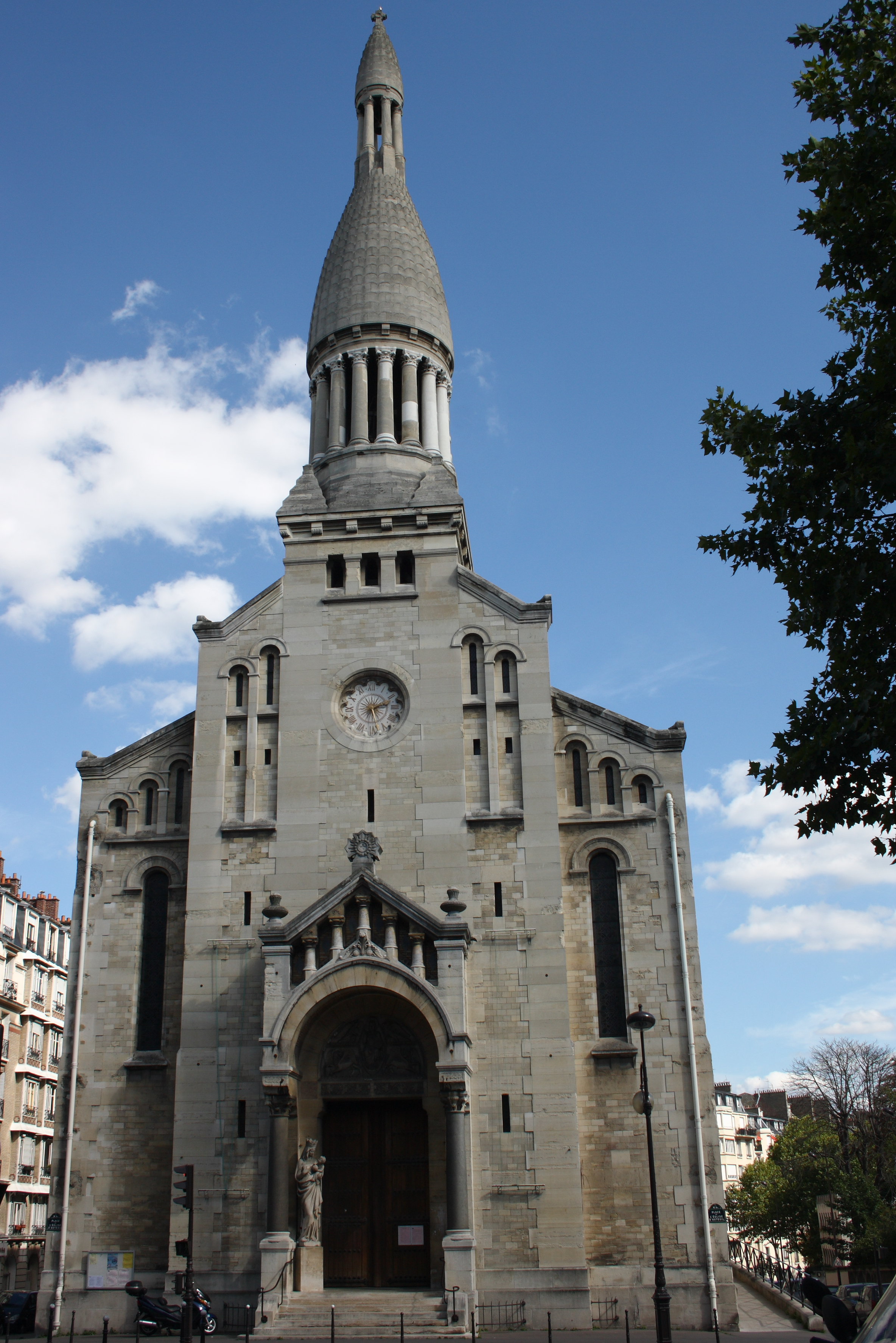 Katholische Pfarrkirche Notre-Dame-d'Auteuil im 16. Arrondissement von Paris